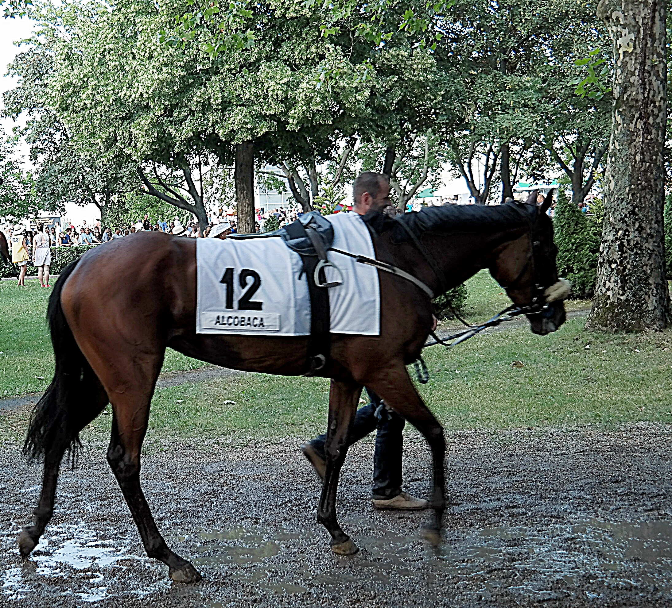 Magyar Derby 2013. Alcobaca A legjobb kanca. Kincsem Park.